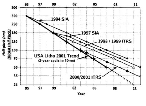 شکل 3- نمایش نیم گام لیتوگرافی استفاده شده در حجم زیادی از تولیدات همانطور که توسط مدل های متفاوت نقشه فناوری بین المللی برای نیمه هادی ها پیش بینی شده است.